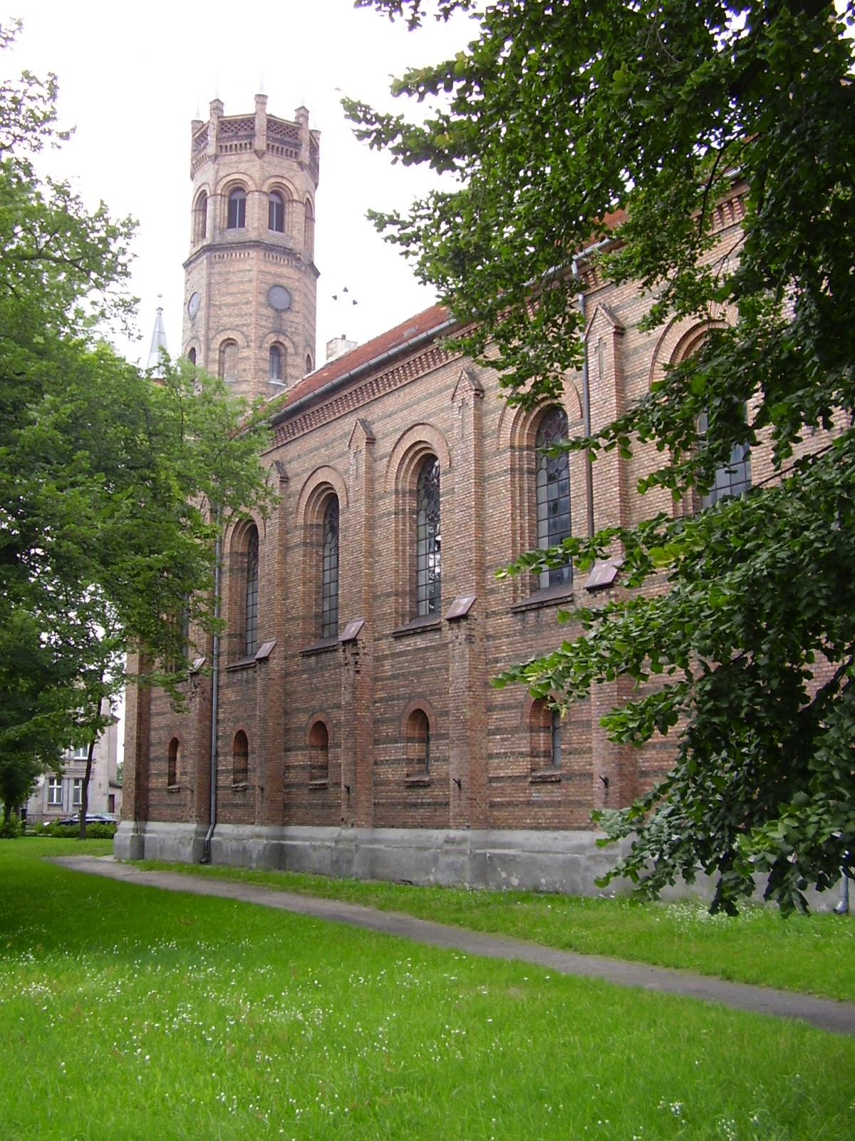 Kościół Świętego Zbawiciela w Skwierzynie